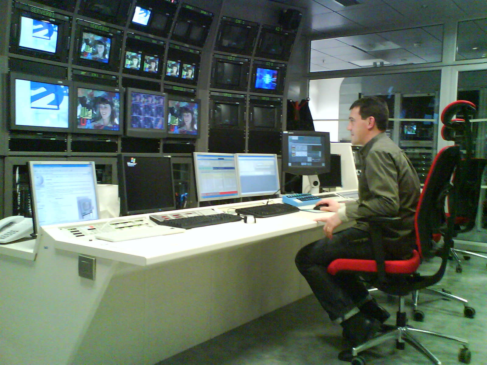 Control de continuidad del canal ETB 1 de Euskal Telebista.